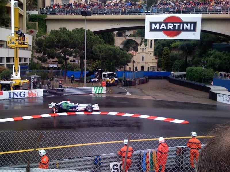 Monaco, May, 2008 final race